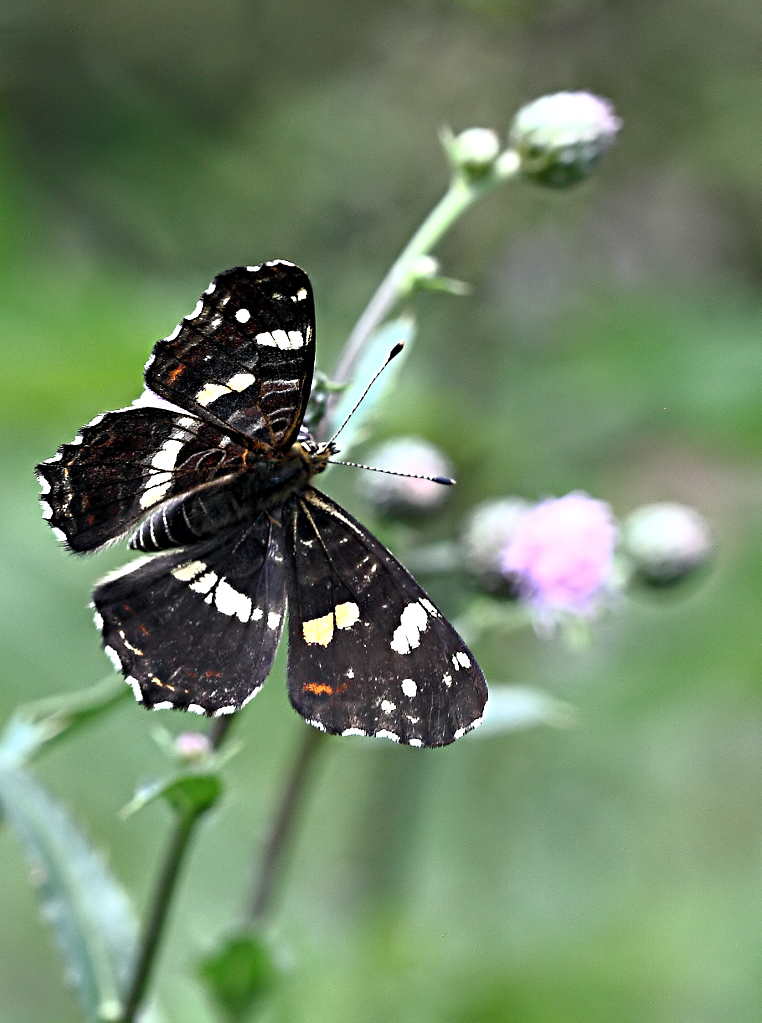 Sachsen: Landkärtchen